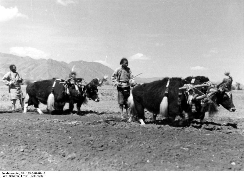 Schigatse-Taktse, Ackerbau mit Yaks